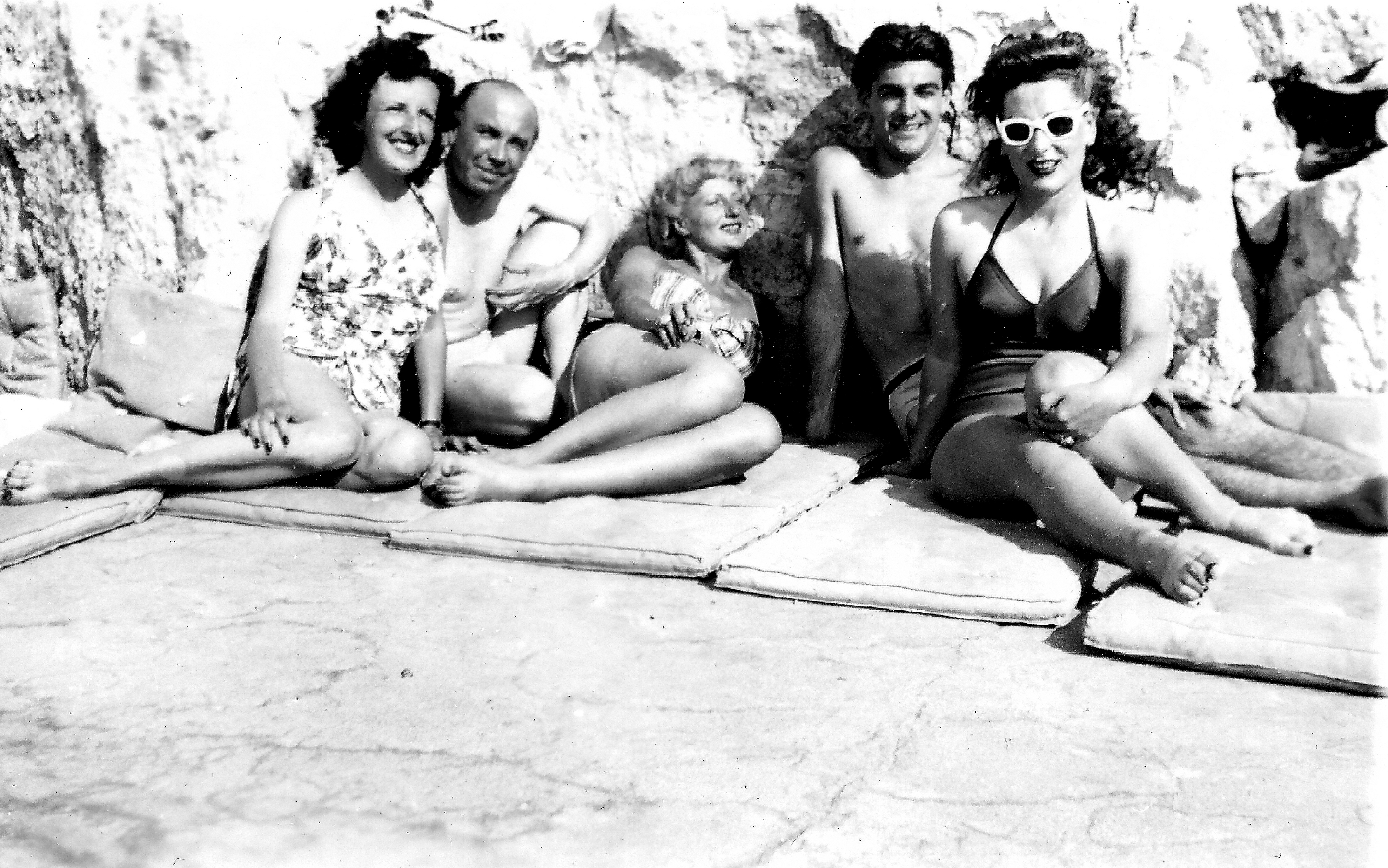 (de gauche à droite) Irène et Emil-Edwin Reinert, Annie Ducaux, Yves Vincent, Vanda Gréville. Été 1947, une pause dans le tournage de Les Requins de Gibraltar à Eden-Roc, Villefranche-sur-Mer (Ce texte figure au verso de cette photographie).